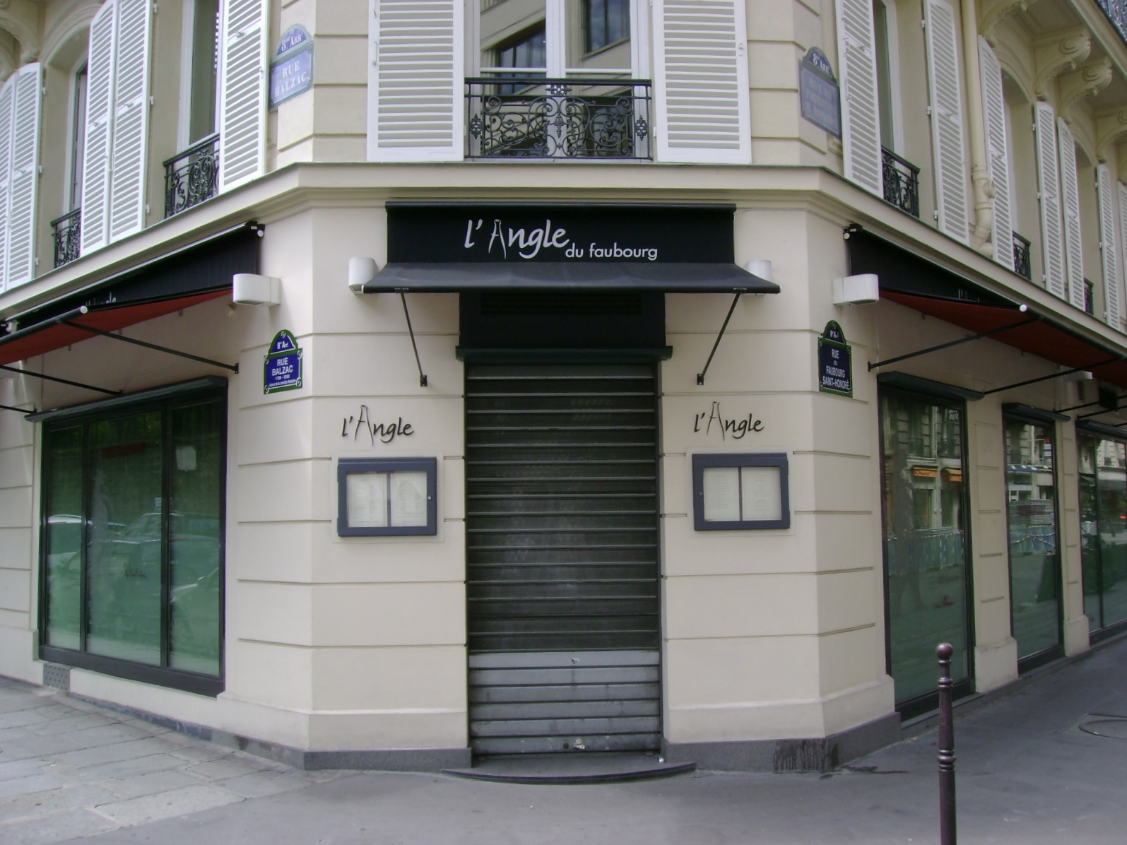 Photo de l'entrée de l'ancien restaurant "Angle du faubourg" (depuis rebaptisé Les 110 de Taillevent), 195 rue du Faubourg Saint-Honoré, angle rue Balzac, Paris,, France